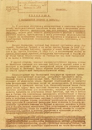 Резолюция на Коминтерна по Македонския въпрос и ВМРО (об.).